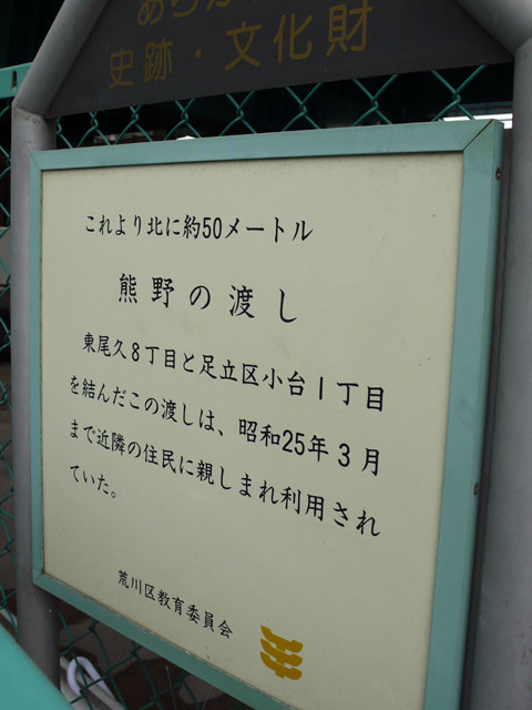 熊野の渡し説明版